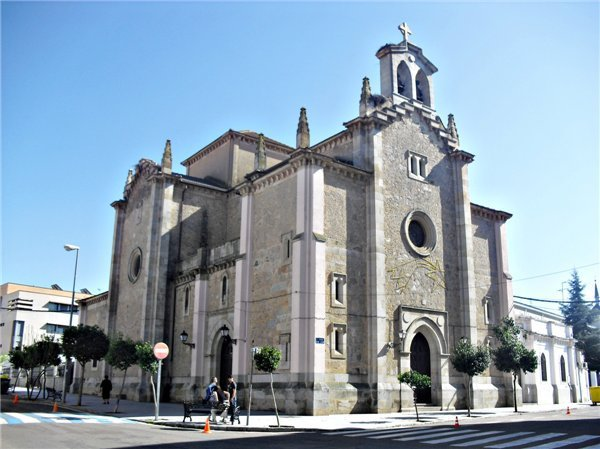 Fachada de la Iglesia Parroquial de San Juan, del siglo XIX.